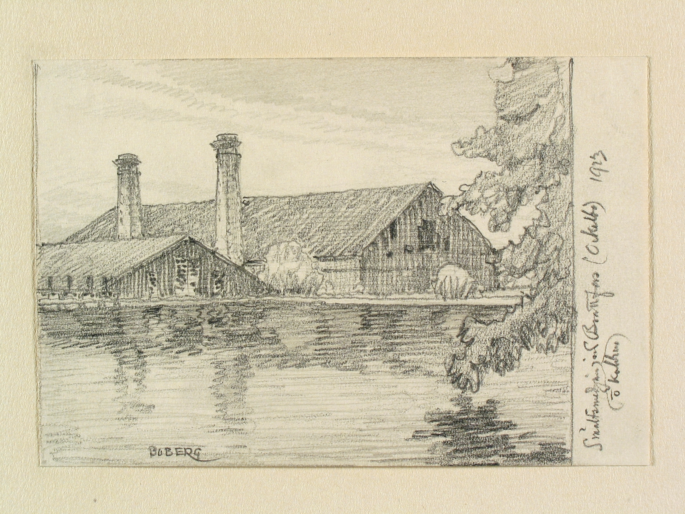 Gästrikland, Ockelbo sn. "Smältsmedjan vid Brattfors". Teckning av Ferdinand Boberg Depicted place: Ockelbo sn., Brattfors (Ortnamn därutöver), Sweden (Q34)